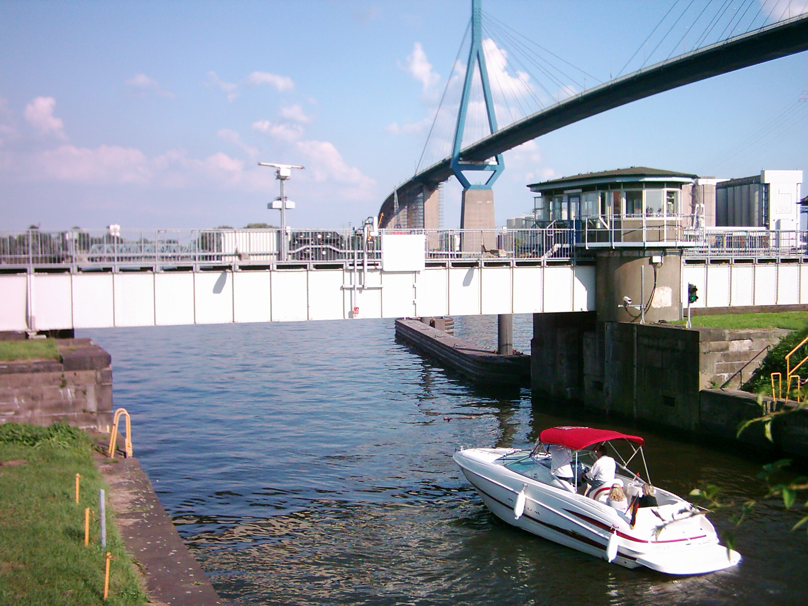 Die Rugenberger Schleuse in Hamburg-Waltershof.